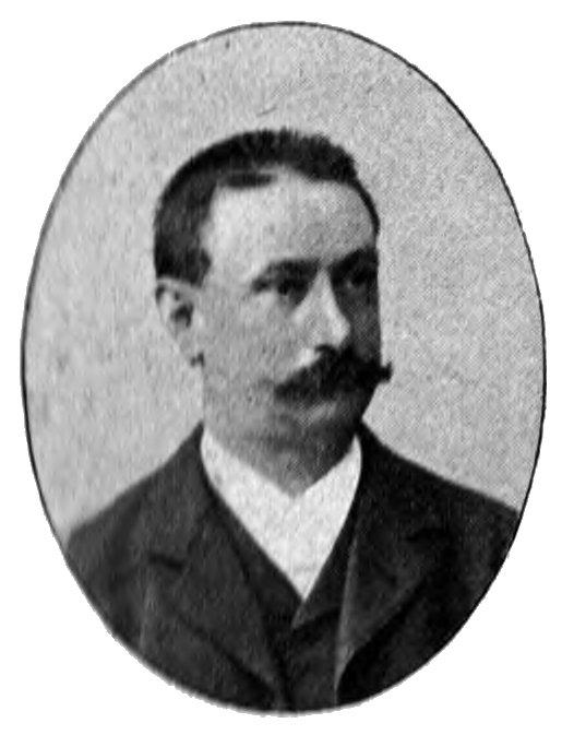 Max Mendheim. In: Das litterarische Leipzig: Illustriertes Handbuch der Schriftsteller- und Gelehrtenwelt... Leipzig: Fiedler, 1897, S. 108